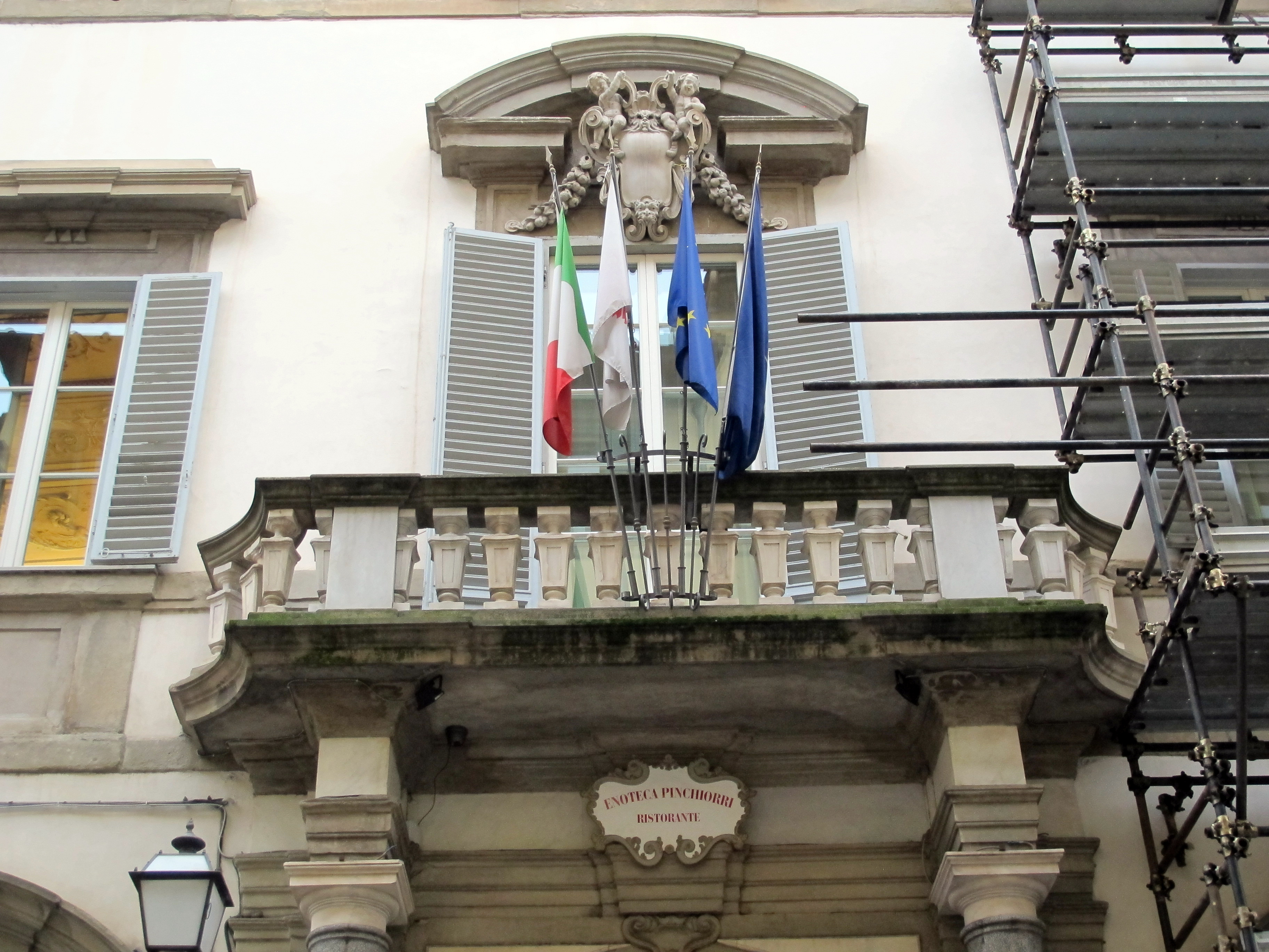 Via ghibellina 96, palazzo jacometti ciofi, balcone